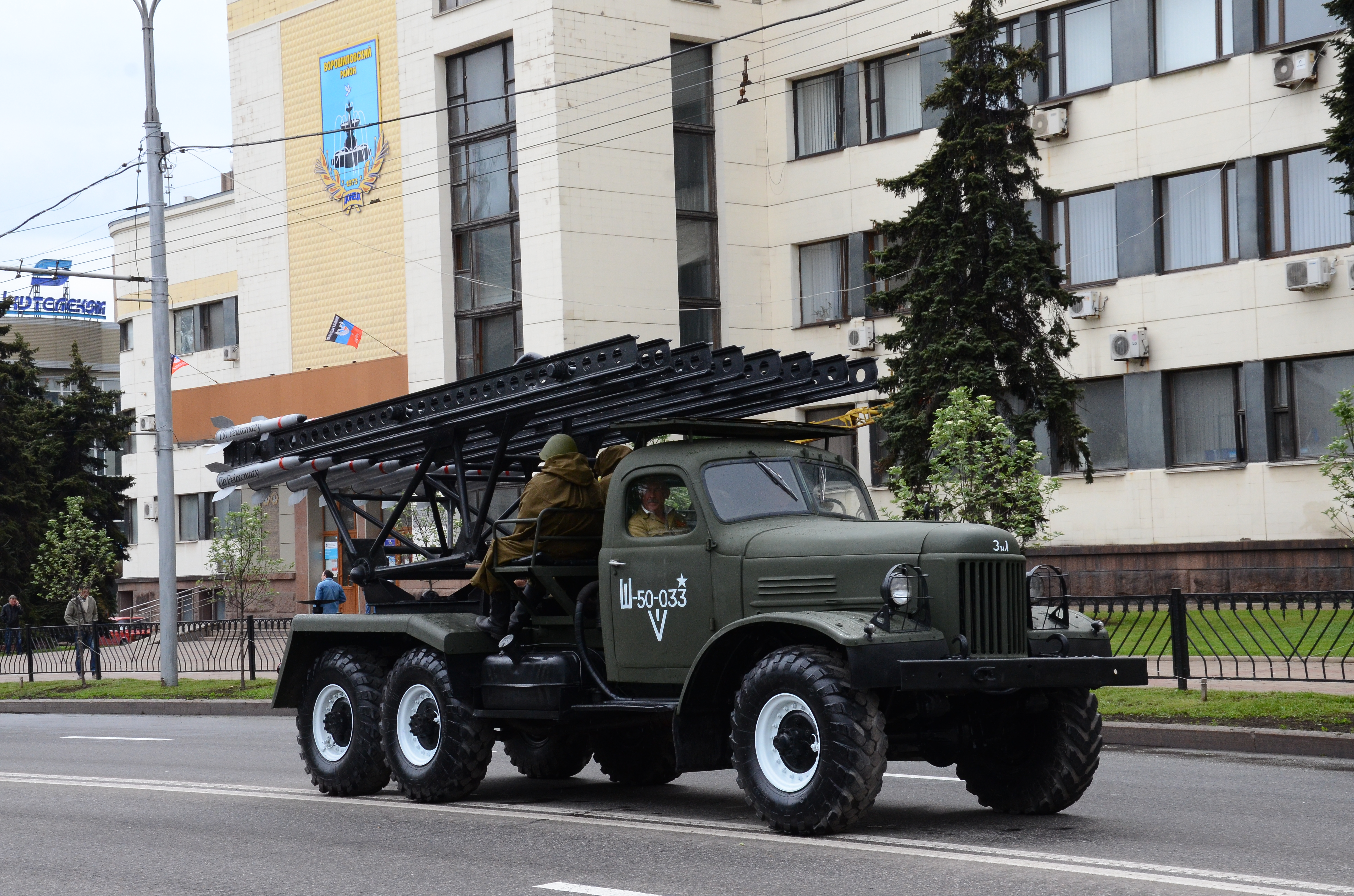 День Победы в Донецке